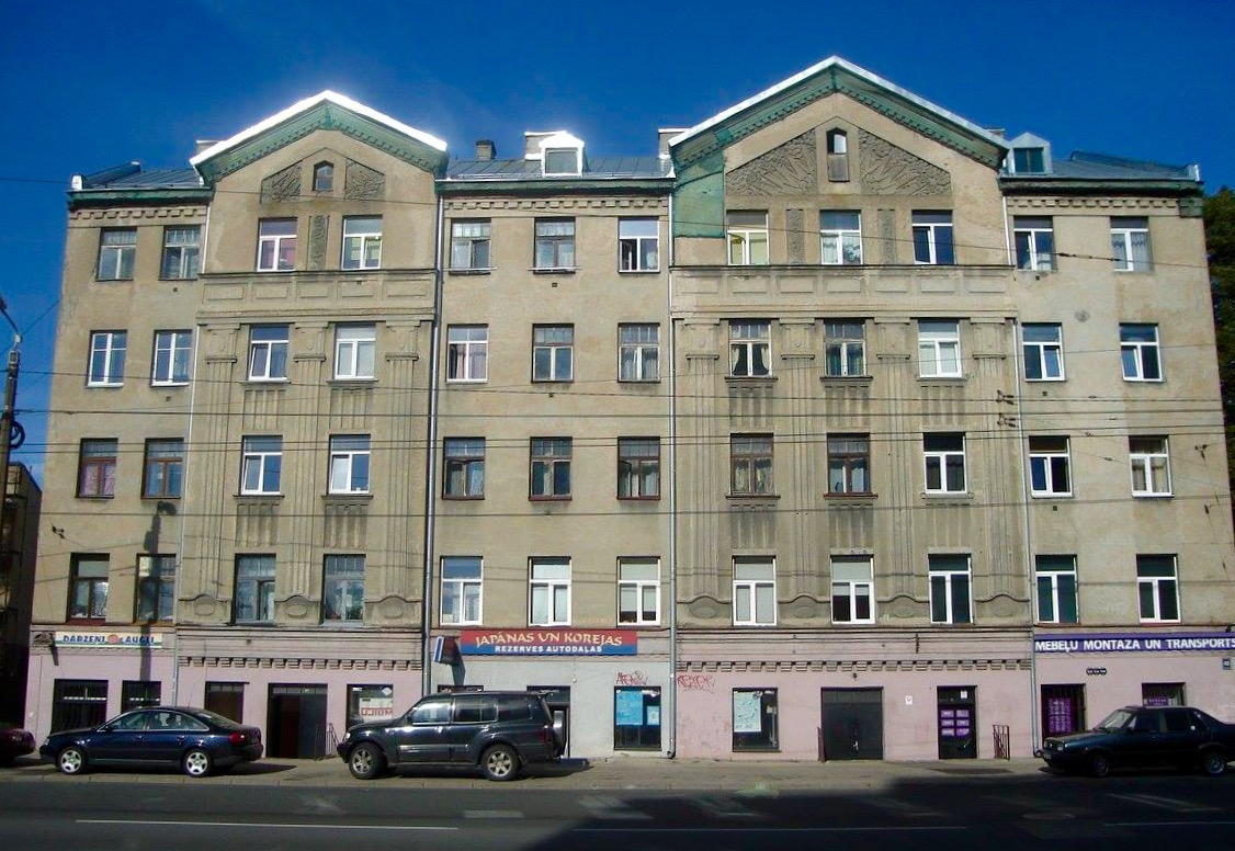 Īres nams, Rīga, Duntes iela 48